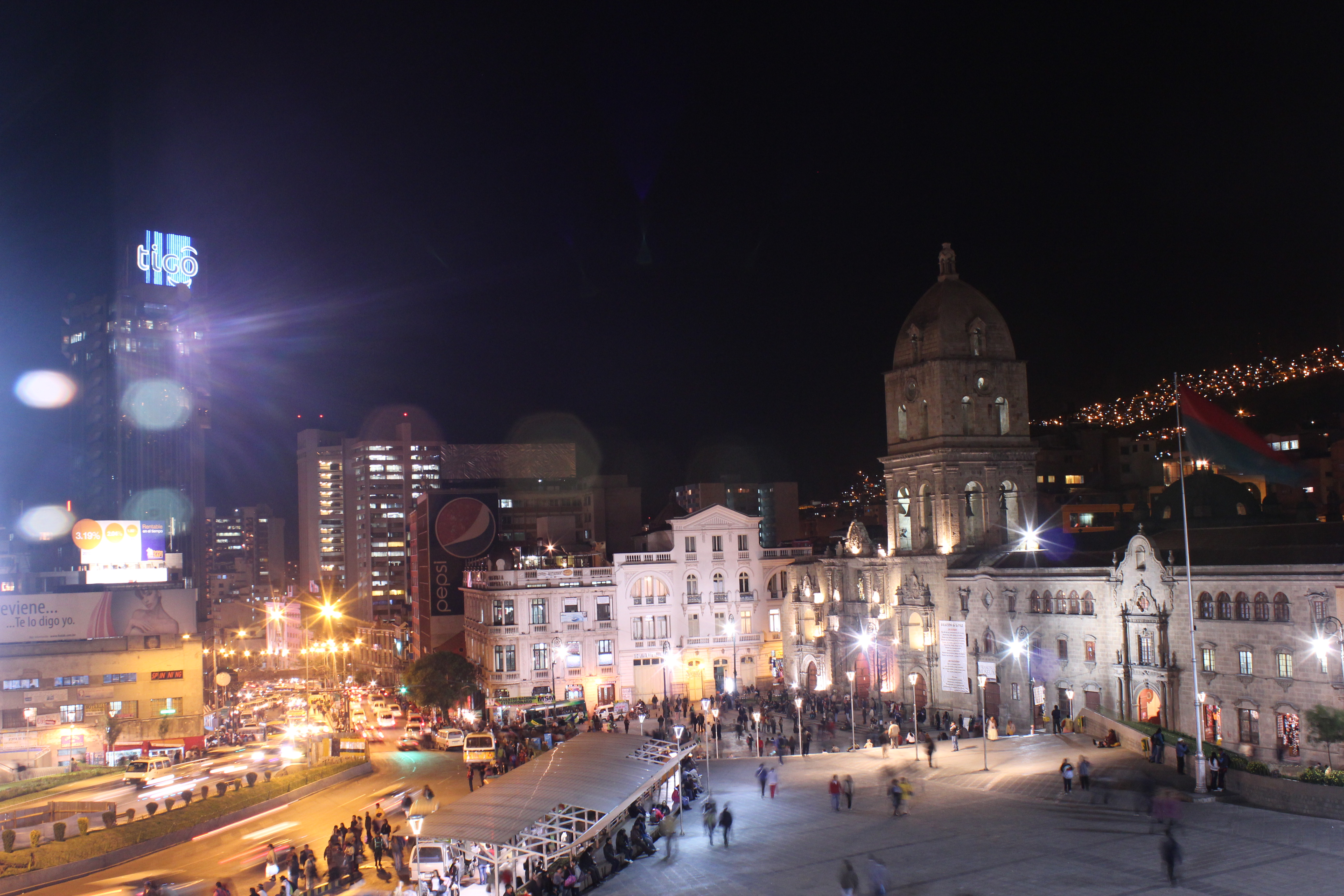 Casa Jaén This medium shows the protected monument with the number L/00-029 in Bolivia.